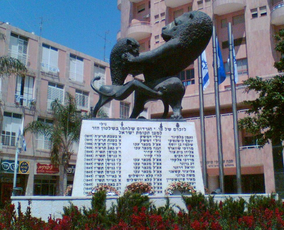 שמות he:עולי הגרדום באנדרטה לזכרו של he:דב גרונר בhe:רמת גן. צילם דוד שי. sculpture/memorial by Chana Orloff in Israel